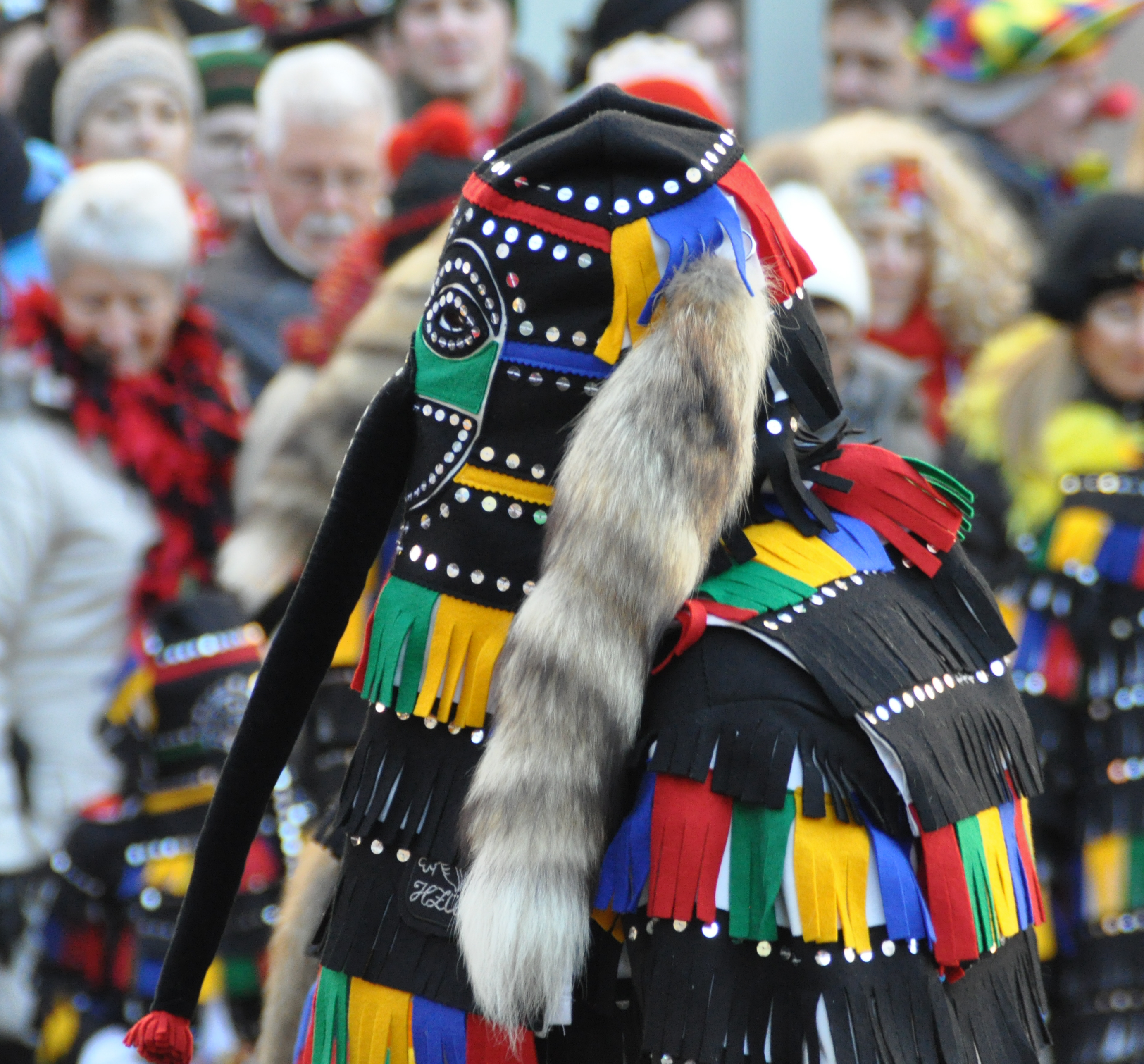 Narrentag 2017 des Viererbunds in Rottweil Narrensprung am Sonntag, 22. Januar 2017, nachmittags Narren der Narrenzunft Überlingen, Narrenfigur: Hänsele